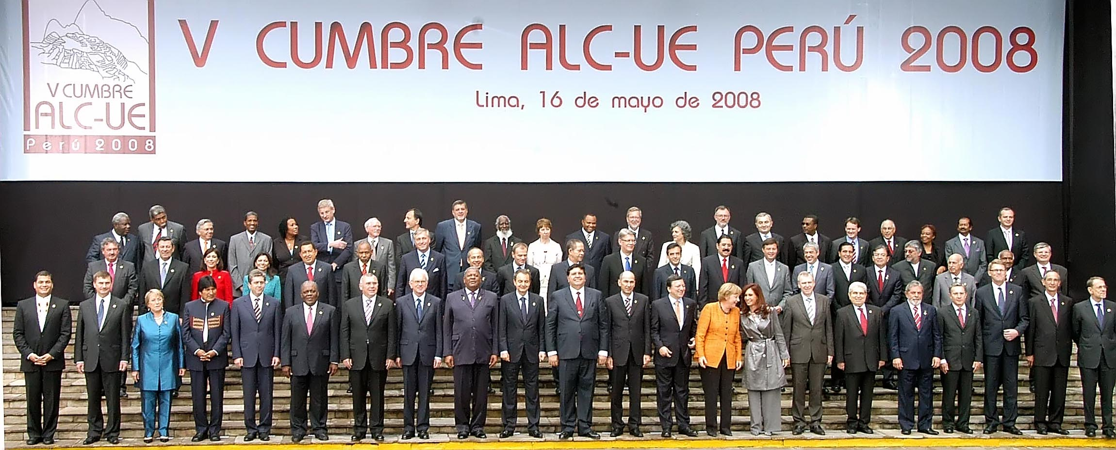 Foto oficial de la V Cumbre ALC-UE (cumbre de jefes de Estado celebrada en Lima, Perú)